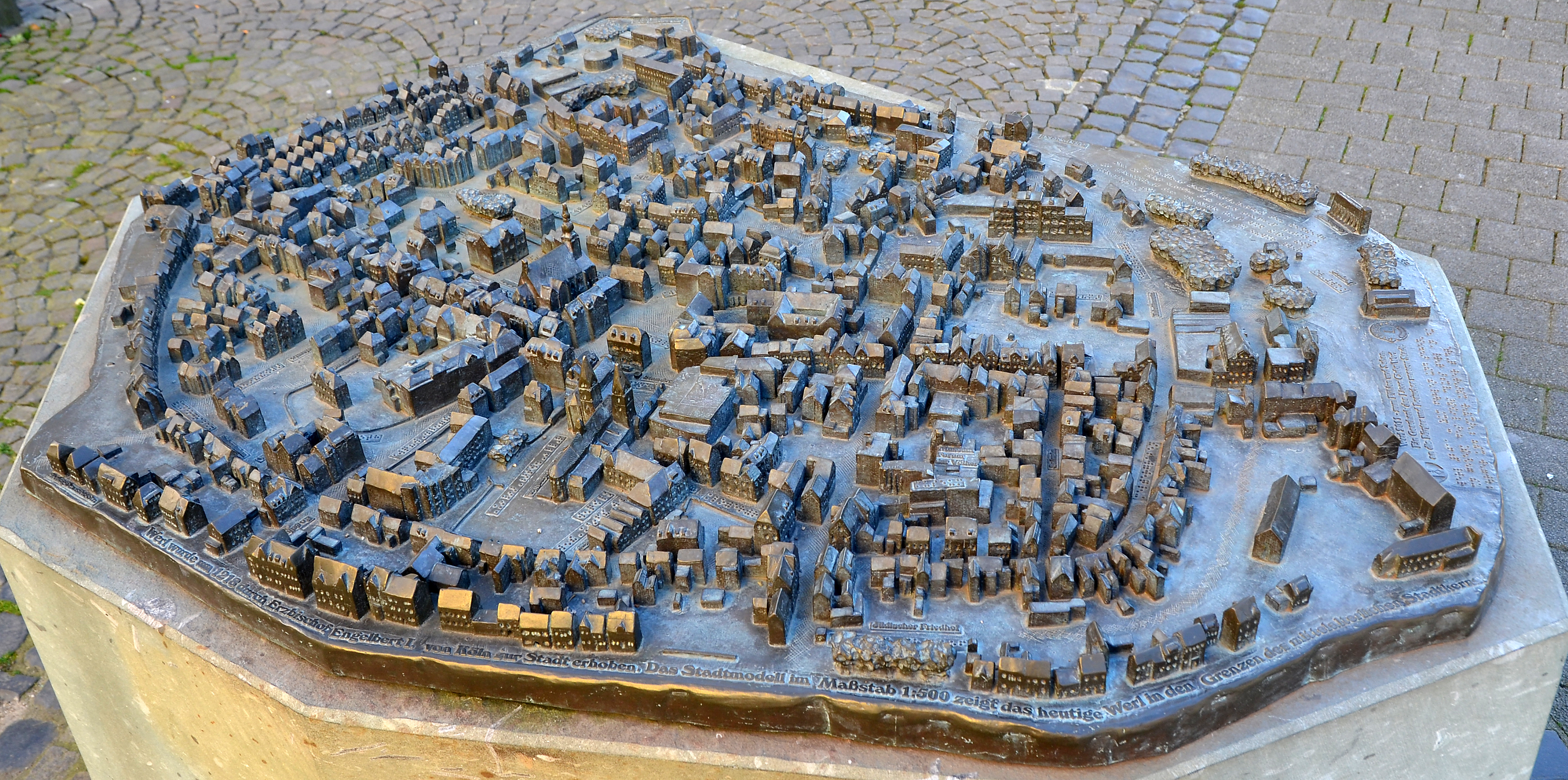 Werl, Stadtmodell (1)